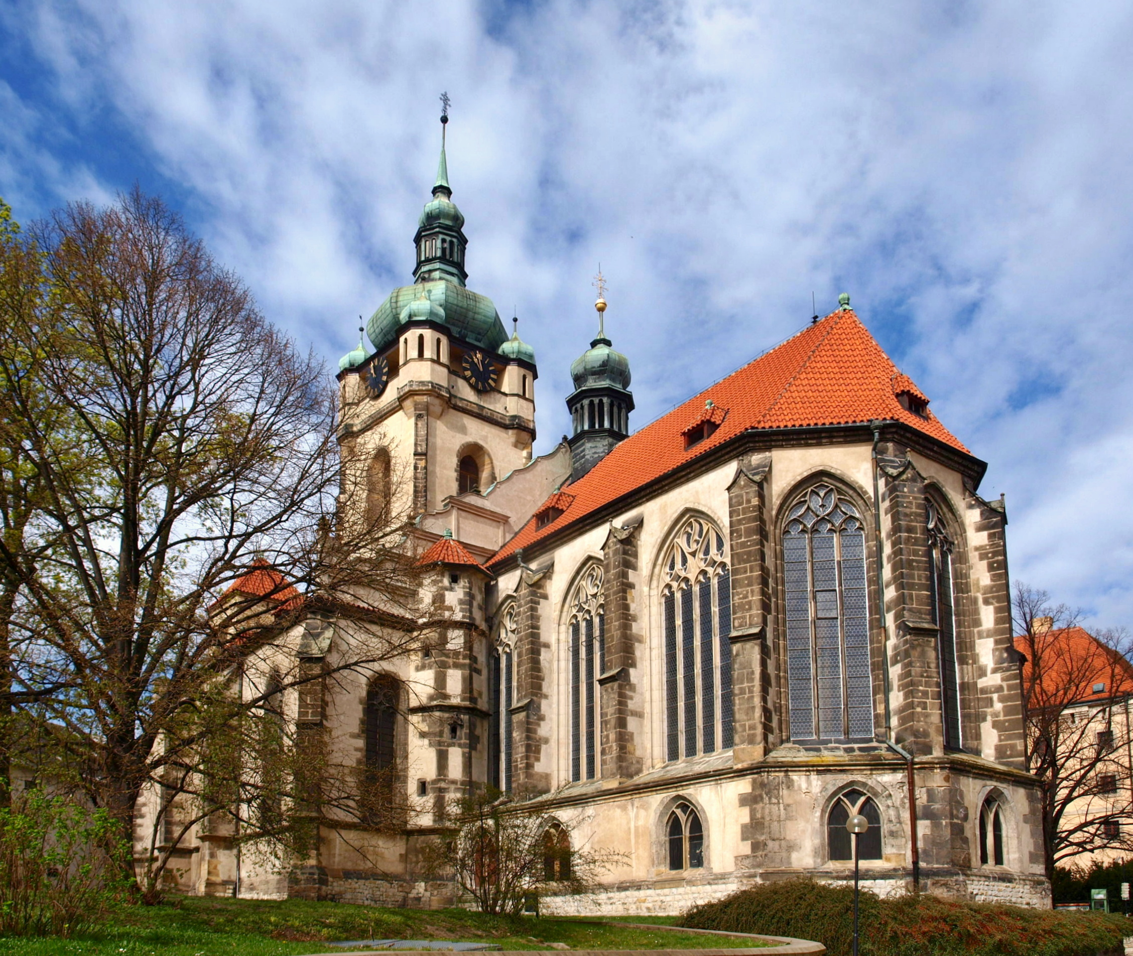 Mělník kostel sv. Petra a Pavla